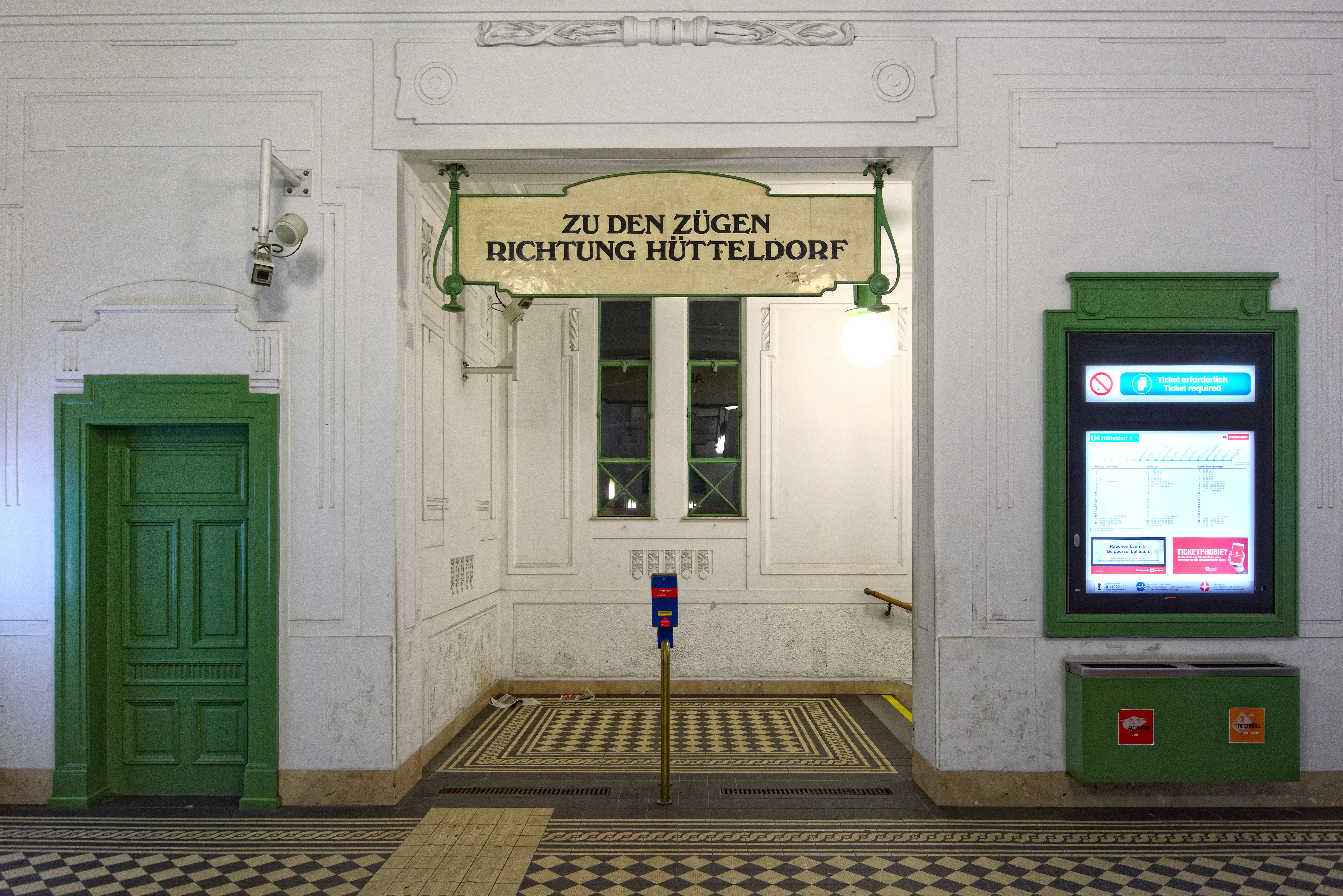 Südlicher Bahnsteigzugang in Richtung Hütteldorf in der Station Stadtpark